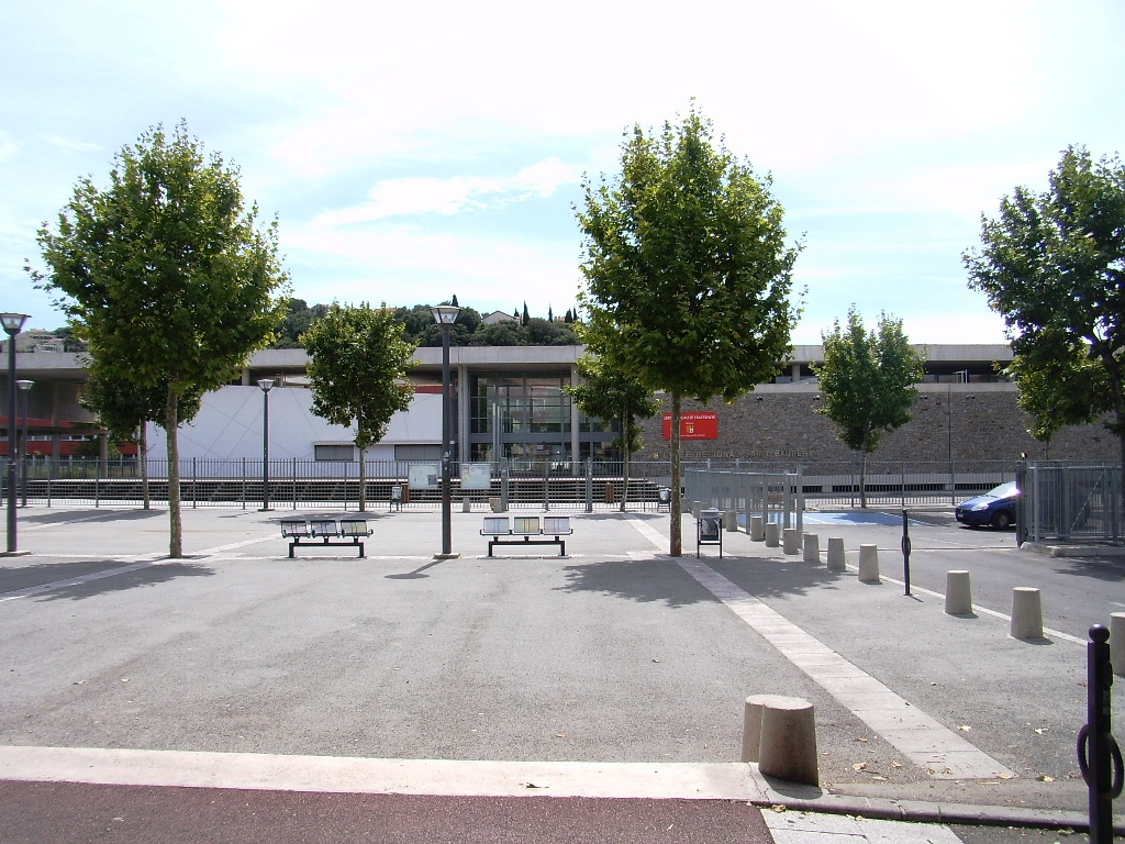 Lycée Saint-Exupéry de Saint-Raphaël (83)